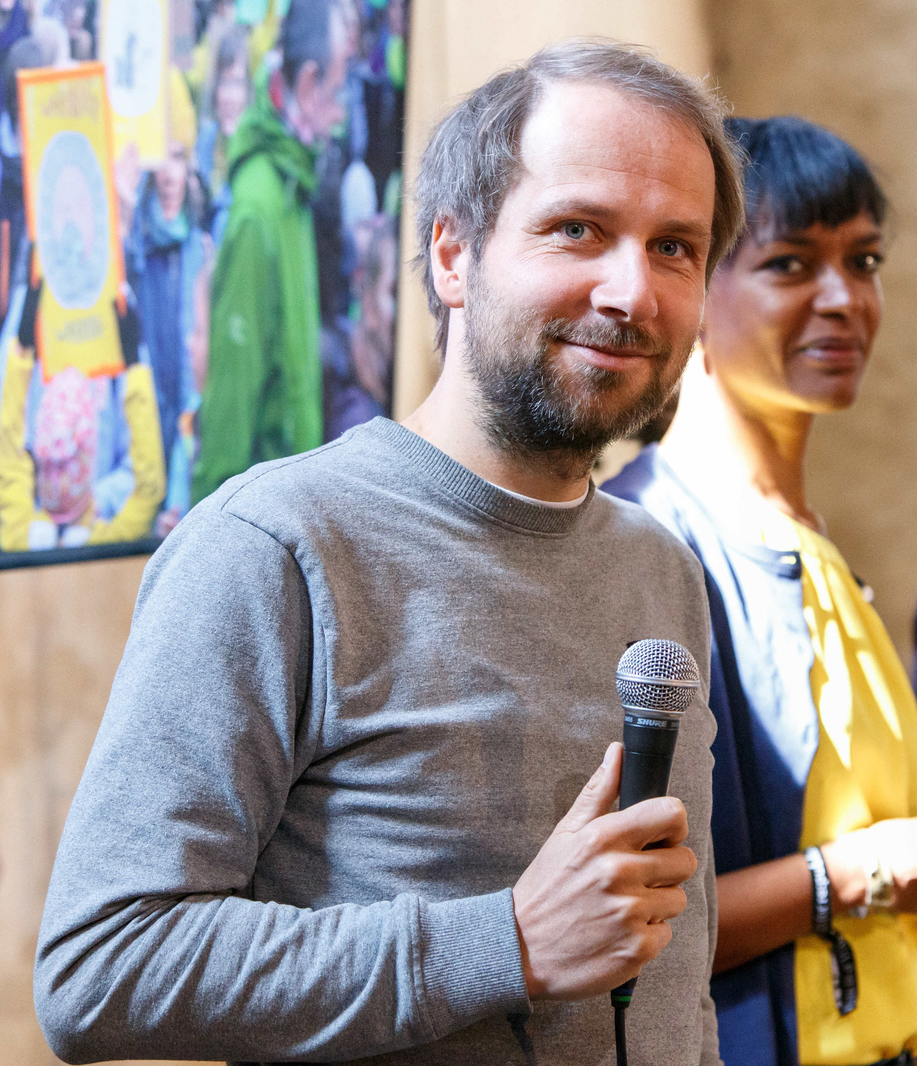 Talk: Wirkungsvolles Unternehmertum: Mit Social Startups das soziale Potenzial digitaler Technik heben Speaker: Katrin Elsemann, Christian Kroll, Seneit Debese